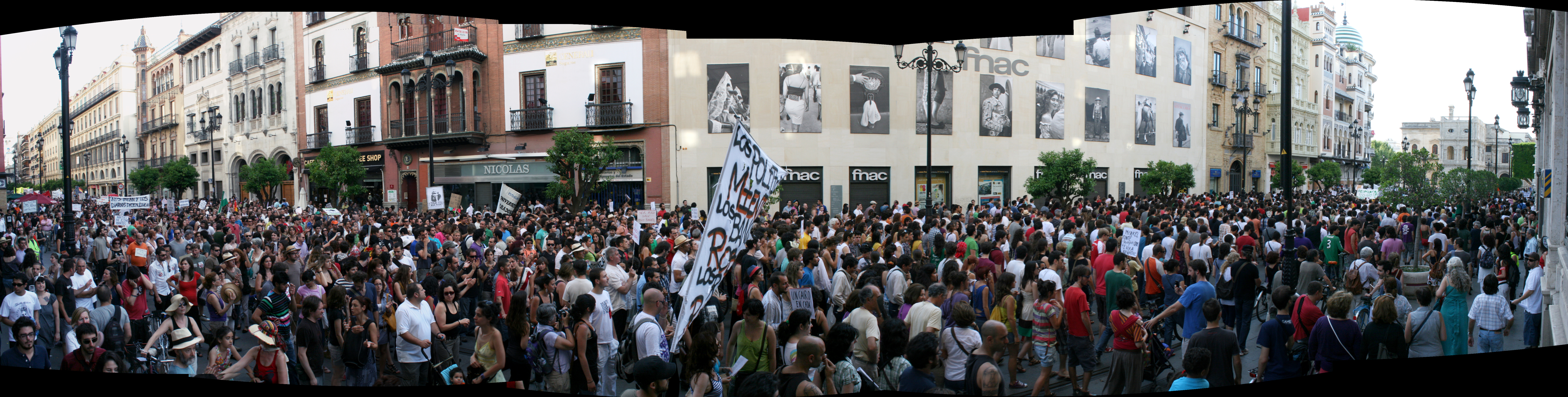 Manifestación Democracia Real Ya en Sevilla 15 Mayo 2011. Avenida de la Constitución